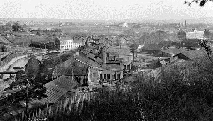 Christiania spigerverk rundt 1926